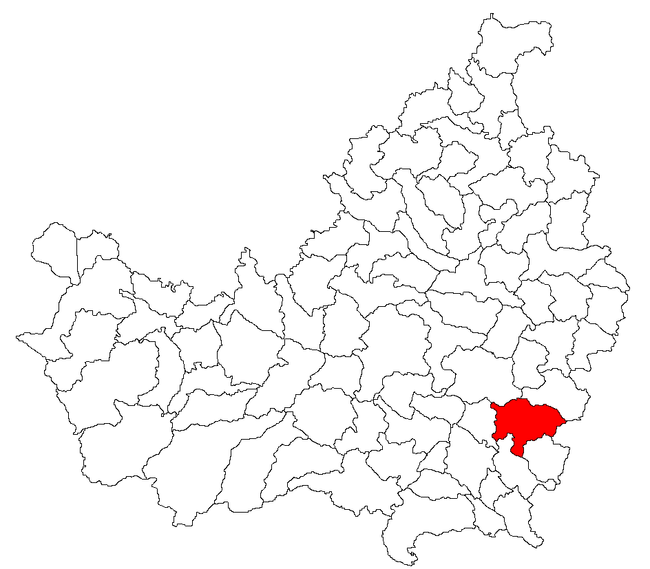 Comuna Ceanu Mare, judeţul Cluj